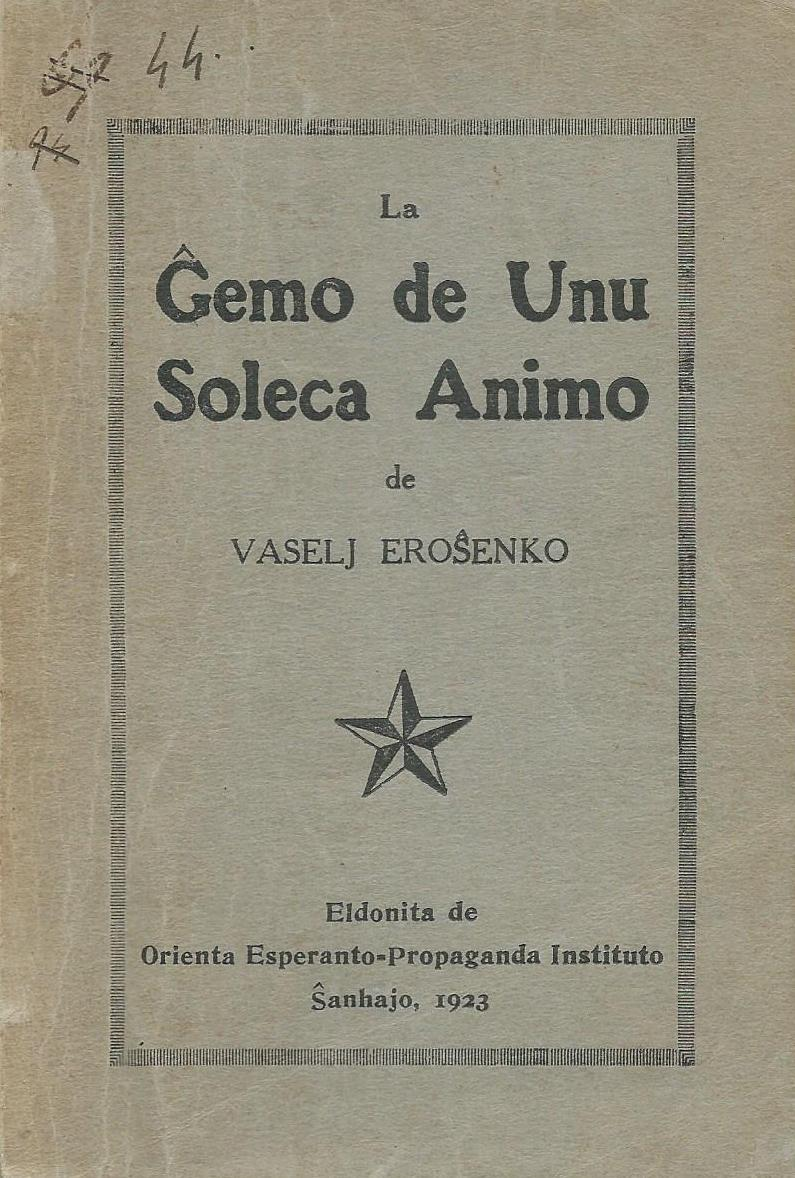 librokovrilo de "La Ĝemo de Unu Soleca Animo"